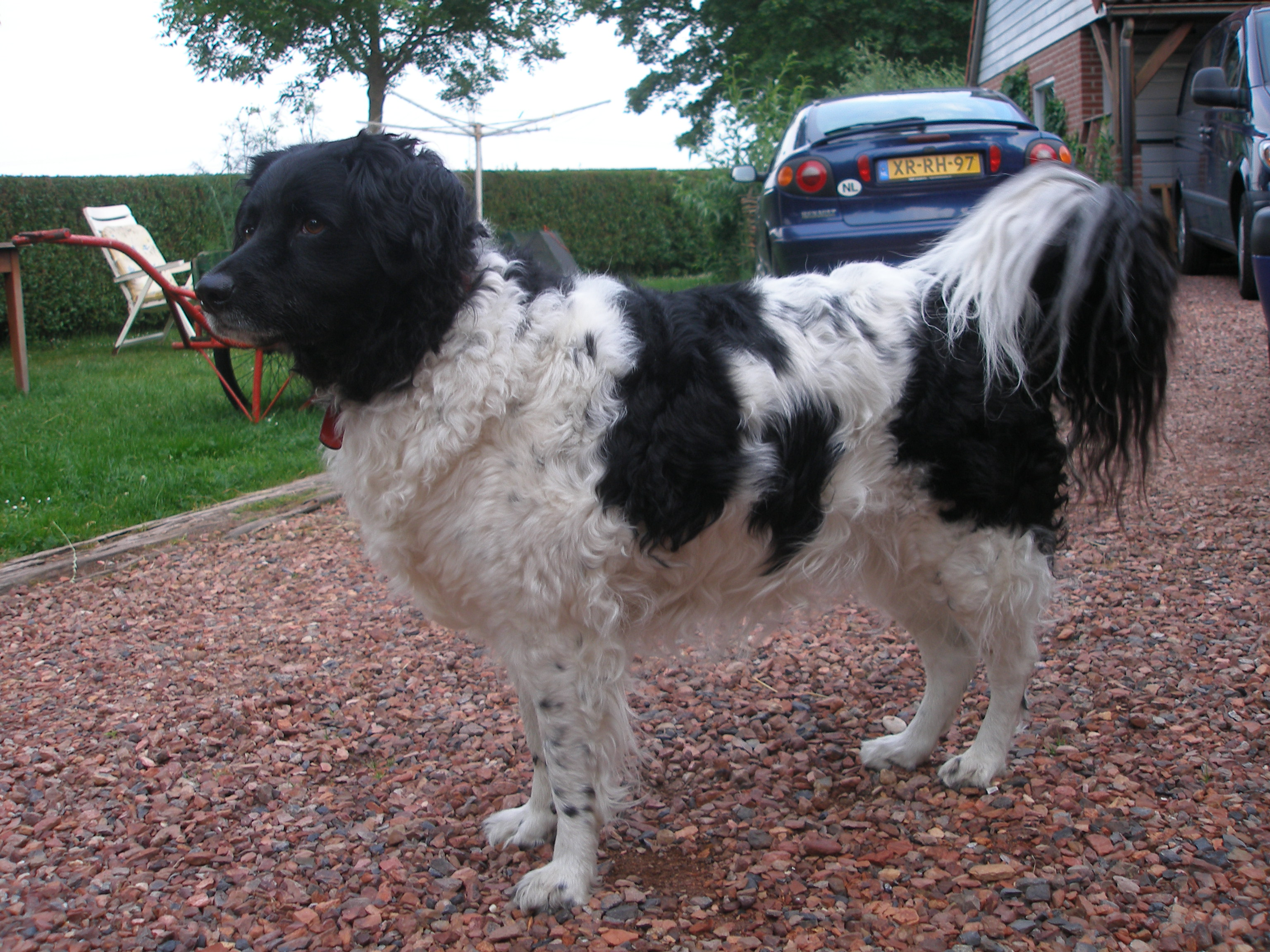 Foto van Friese Stabij, zelf gemaakt.